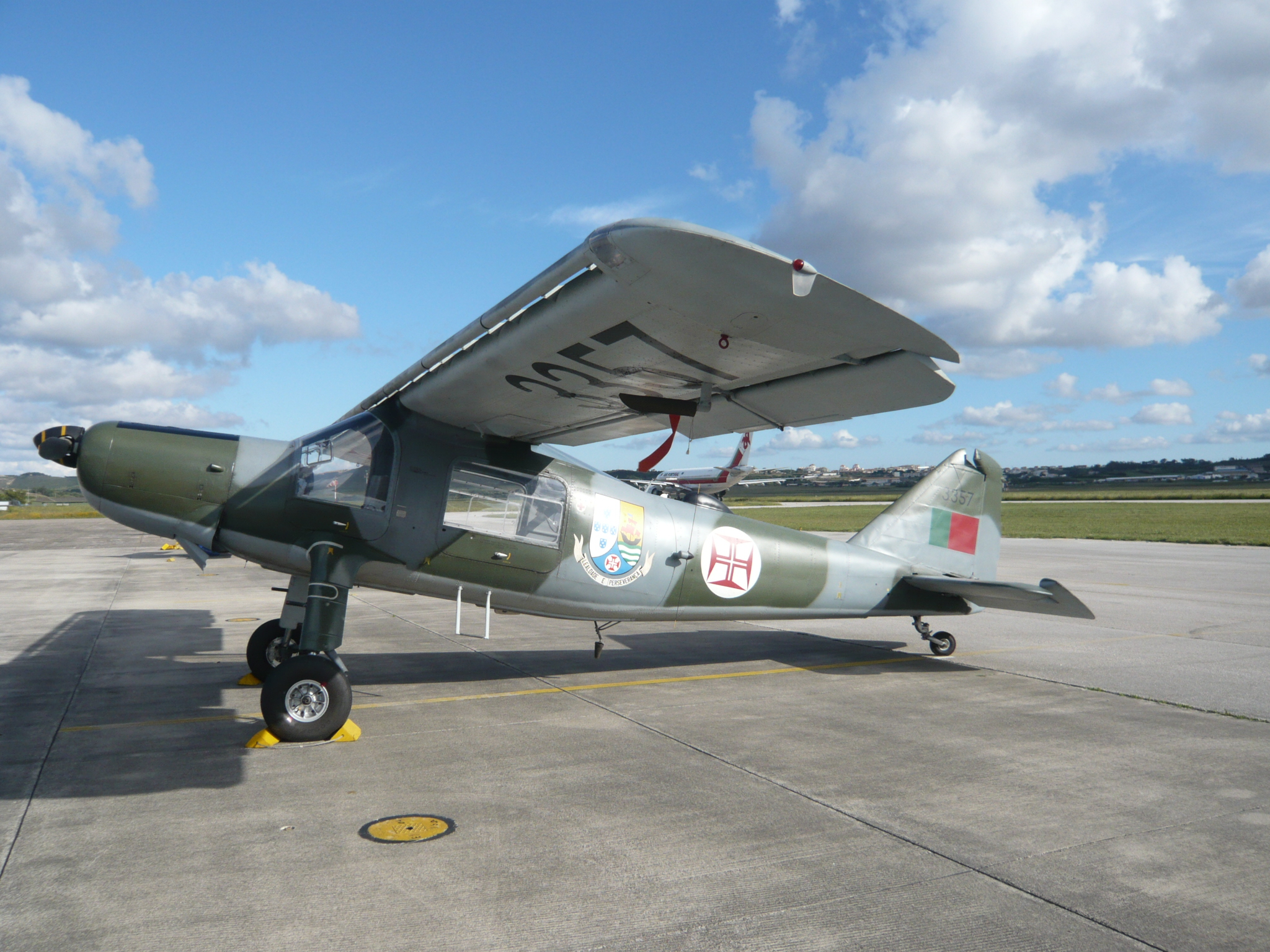 Dornier Do27